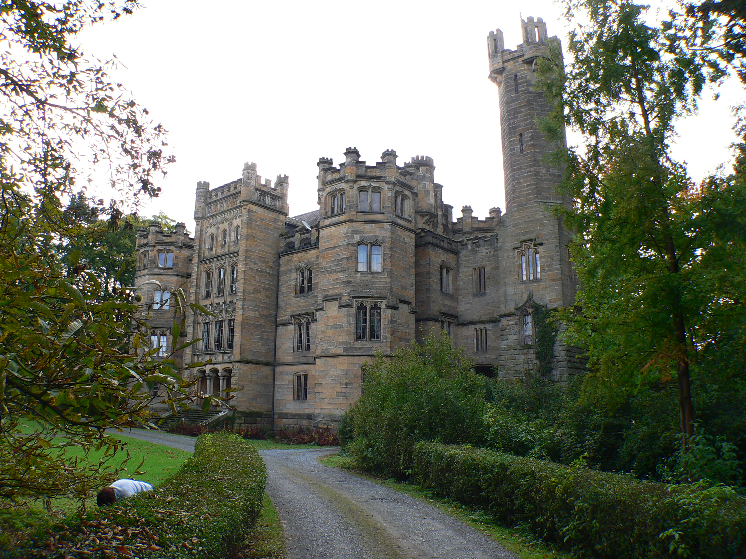 Schloss in Küps-Oberlangenstadt, Bayern, Regierungsbezirk Oberfranken, Landkreis Kronach